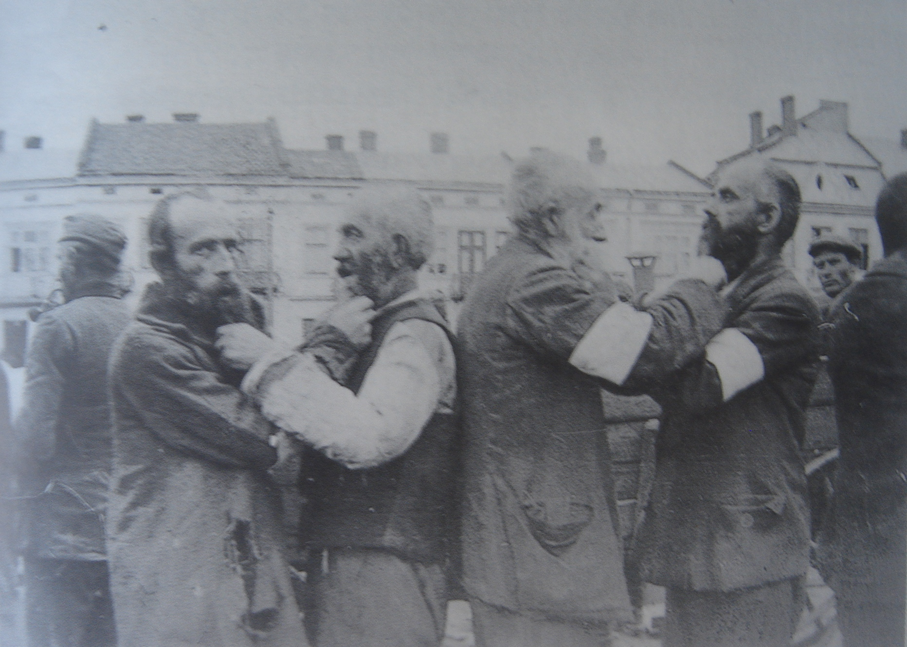 יהודים מכים זה את זה באיומי רצח מהנאצים